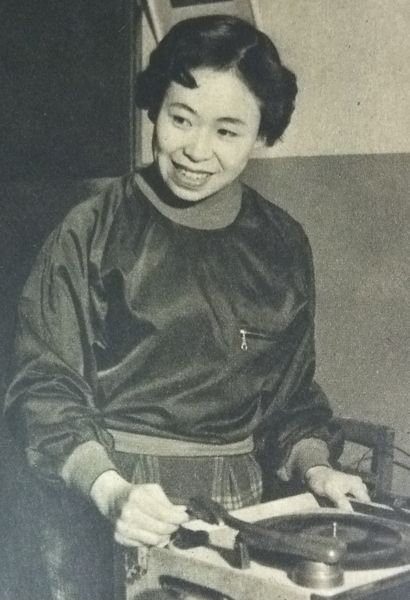 稲田悦子